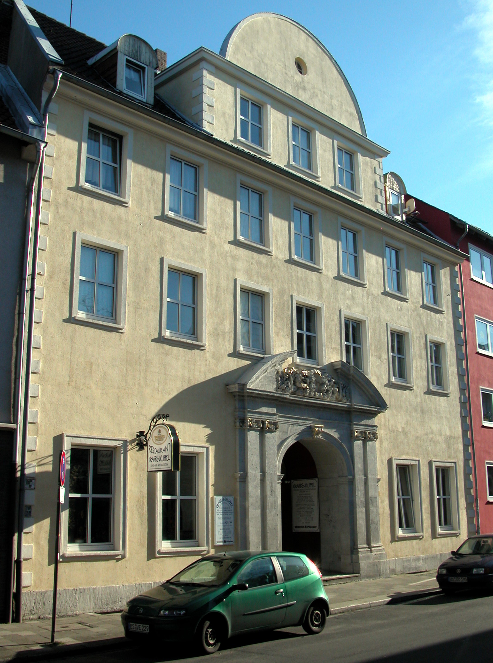 Braunschweig, Breite Straße 18: Gesamtansicht von Nordwesten.